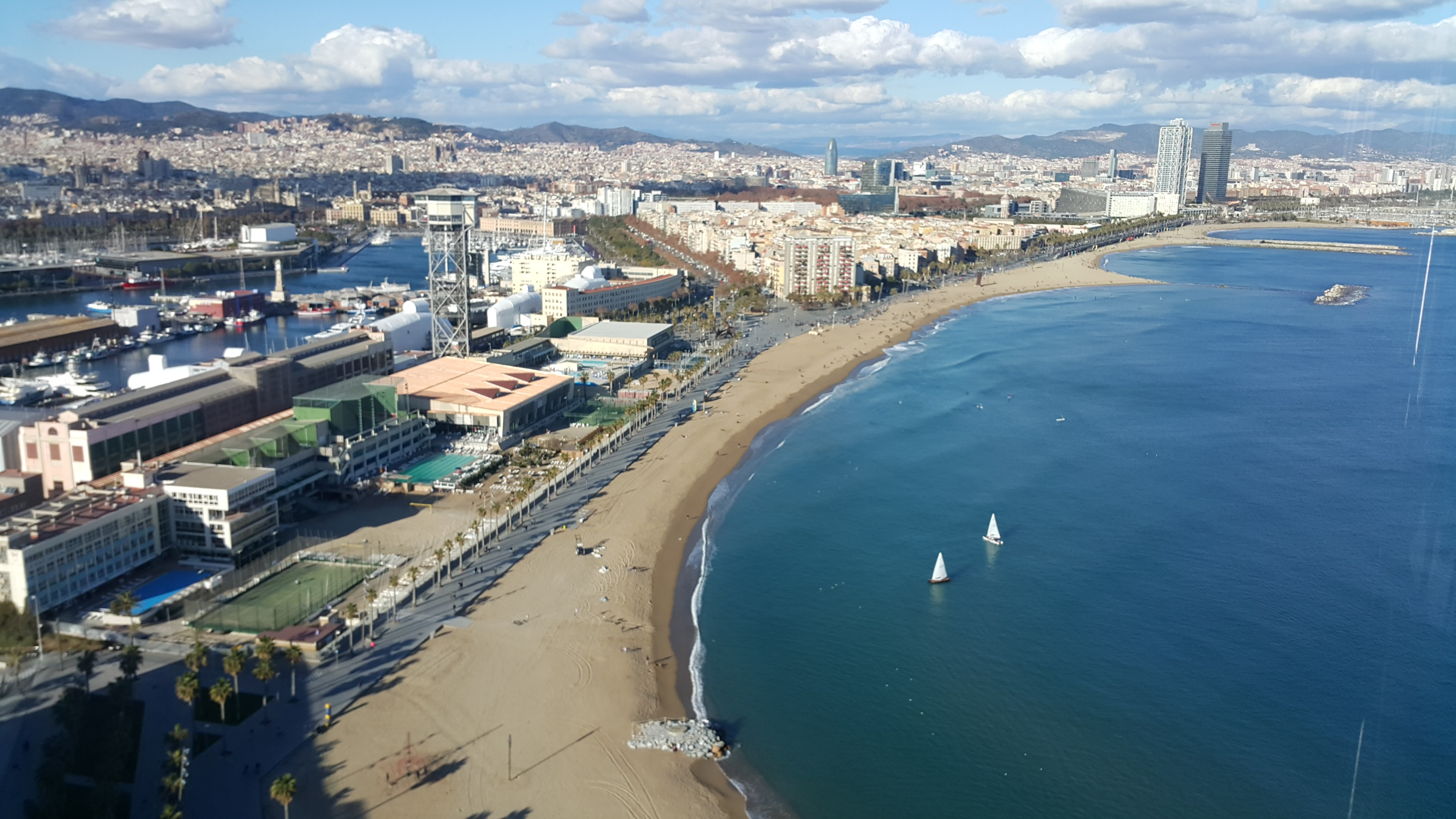 Barcelona Platja de Sant Sebastià i Barceloneta, Vista des del W Barcelona (Hotel)